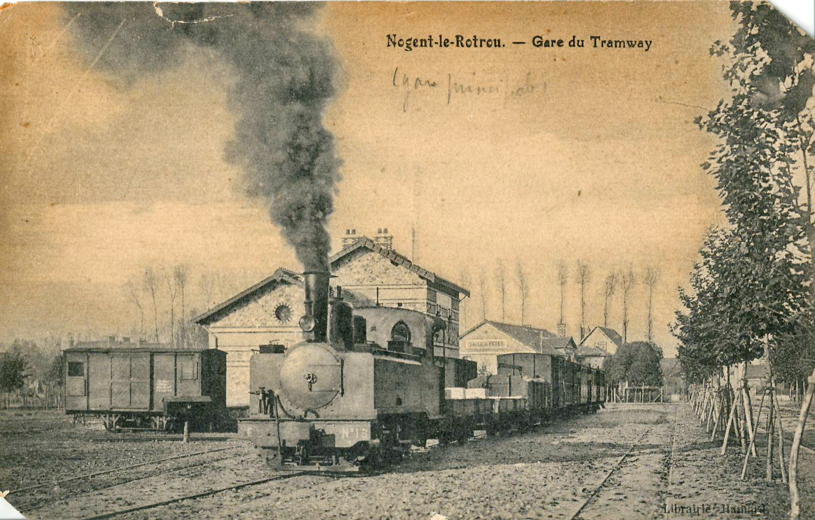 Carte postale ancienne éditée par Librairie Hainard : Nogent-le-Rotrou - Gare du Tramway (Tramways d'Eure-et-Loir)